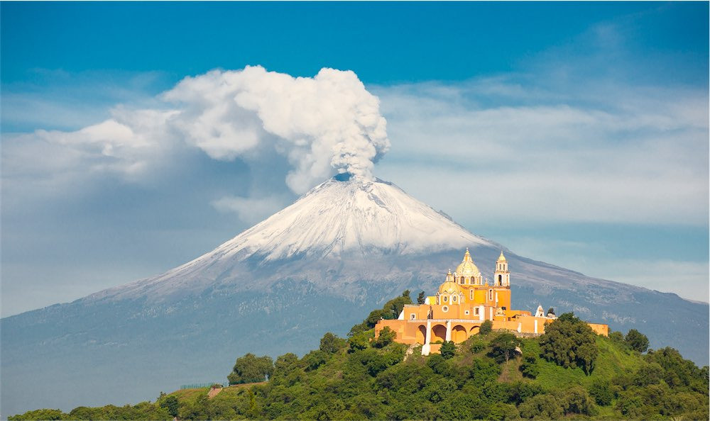 Iglesia de Nuestra Señora de los Remedios, Cholula, Puebla/ Nuestra Señora de los Remedios church